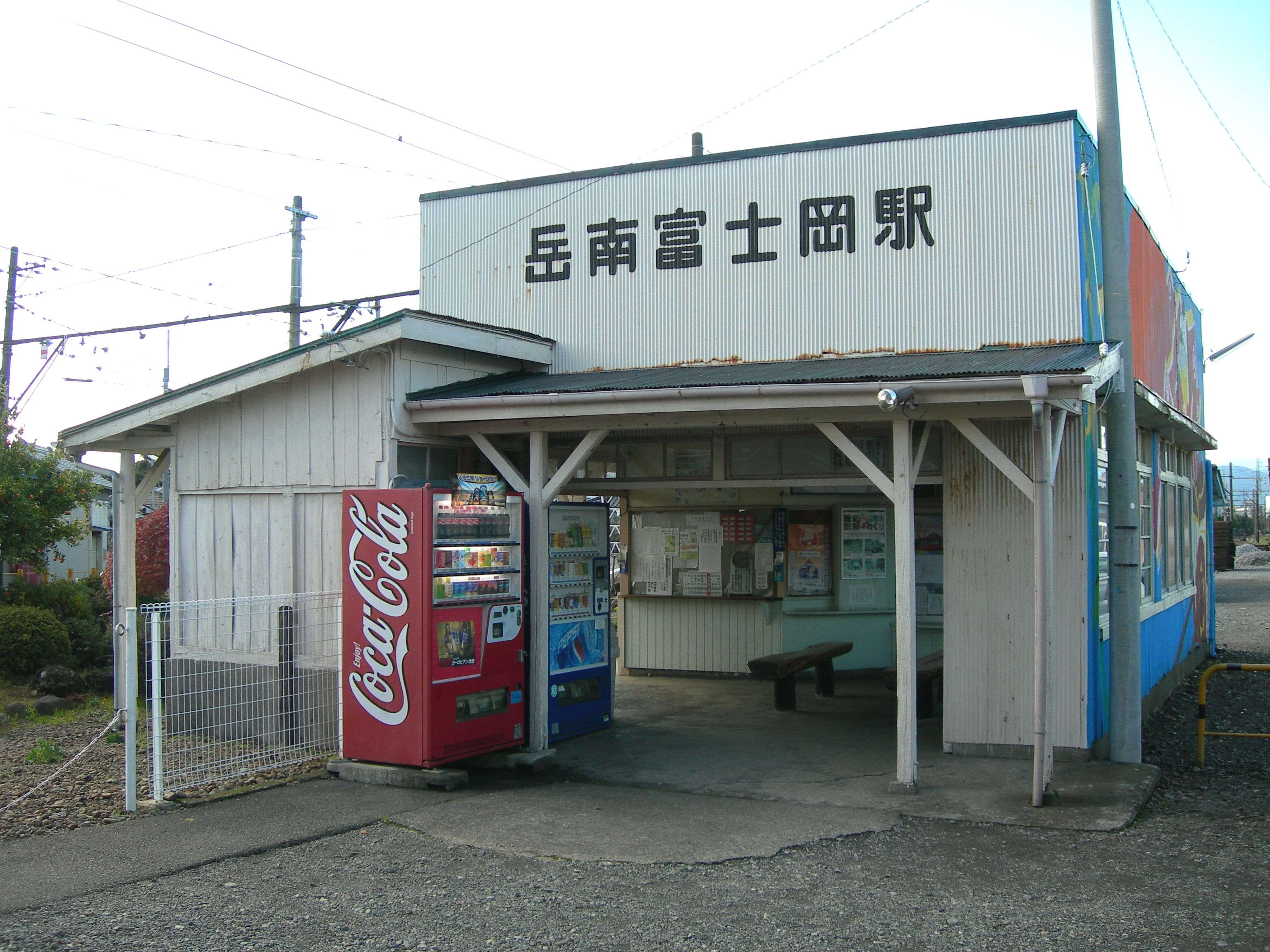 岳南富士岡駅